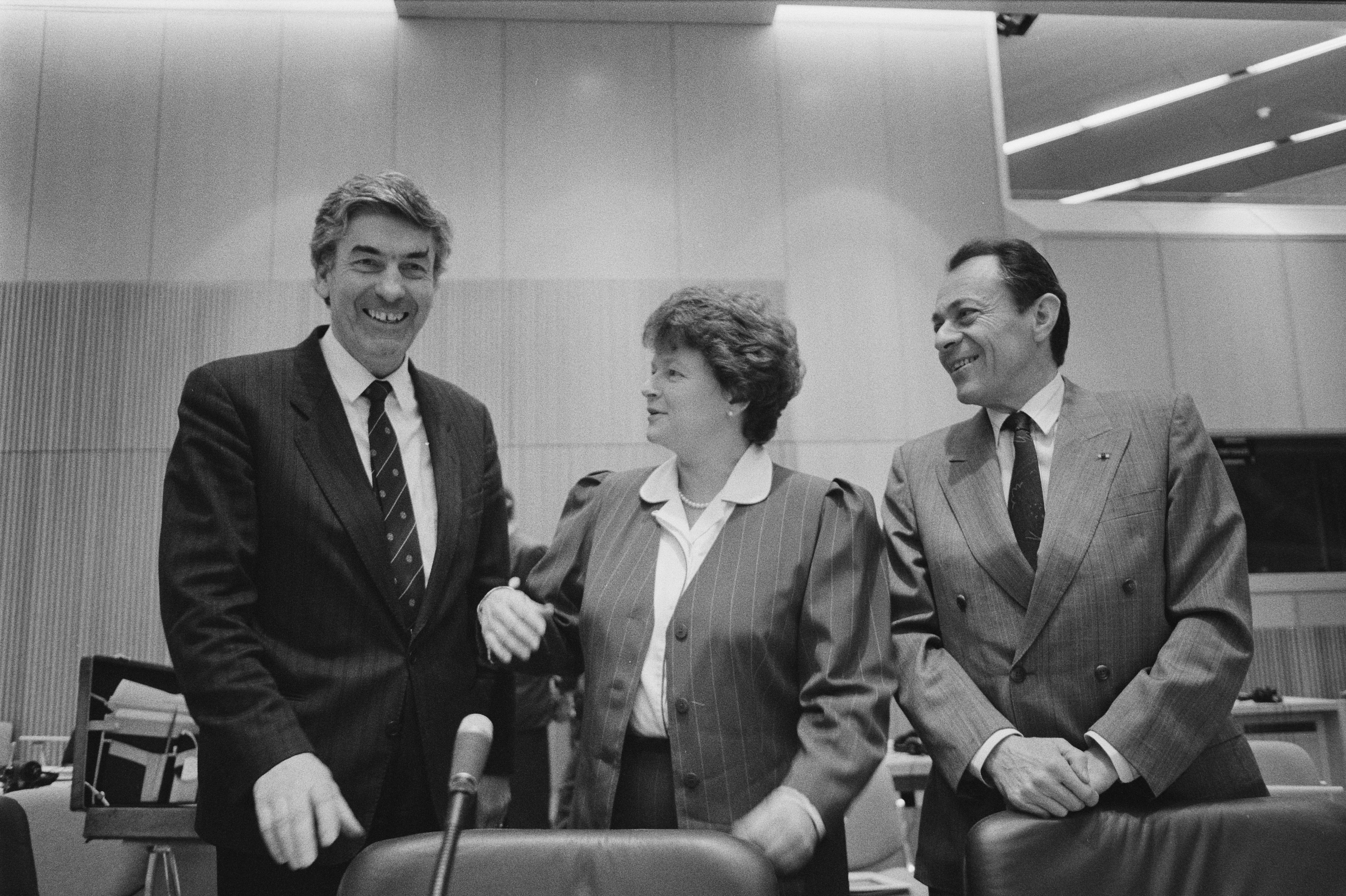 Collectie / Archief : Fotocollectie Anefo Reportage / Serie : Voorvergadering voor de internationale milieuconferentie Beschrijving : Premiers Lubbers, Brundtland (Noorwegen) en Rocard (Frankrijk) Datum : 10 maart 1989 Trefwoorden : milieuconferenties, premiers, vergaderingen Persoonsnaam : Brundtland, G.H., Lubbers, Ruud, Rocard, M. Fotograaf : Croes, Rob C. / Anefo Auteursrechthebbende : Nationaal Archief Materiaalsoort : Negatief (zwart/wit) Nummer archiefinventaris : bekijk toegang 2.24.01.05 Bestanddeelnummer : 934-4188